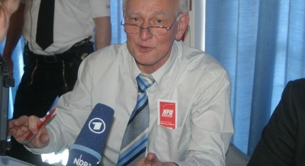 Der NPD-Politiker Ulrich Eigenfeld gibt beim NPD-Bundesparteitag 2009 in Berlin ein Fernseh-Interview.